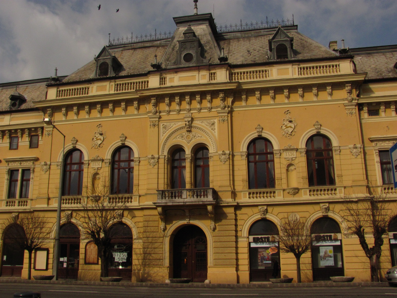 A képen a szarvasi Árpád Szálló épülete látható. Azonosító -3345. 1895-1896 között szecessziós stílusban a millenniumi ünnepségek alkalmából építették. - Békés m., Szarvas, Szabadság út 32.